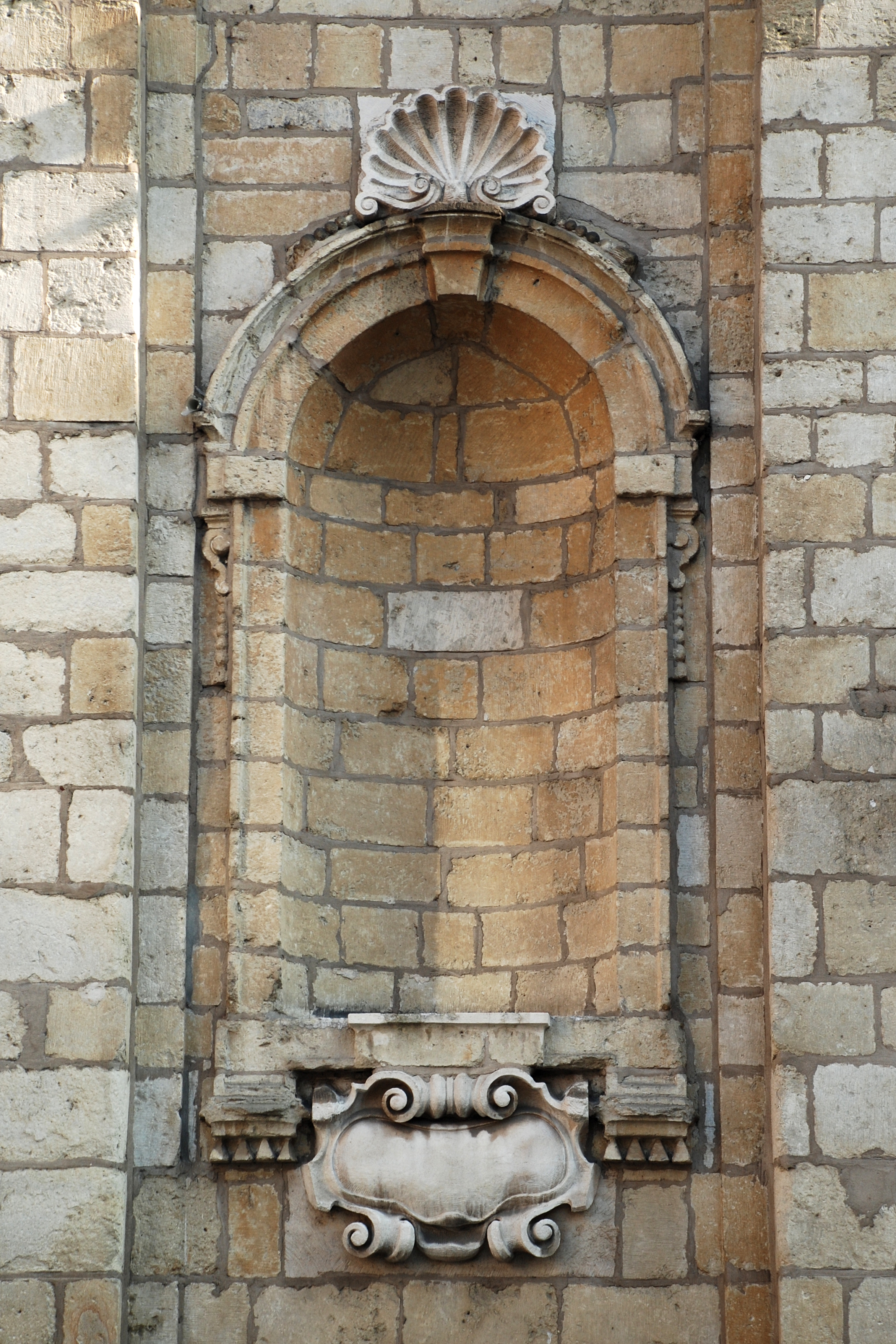 Belgique - Bruxelles - Chapelle Sainte-Anne